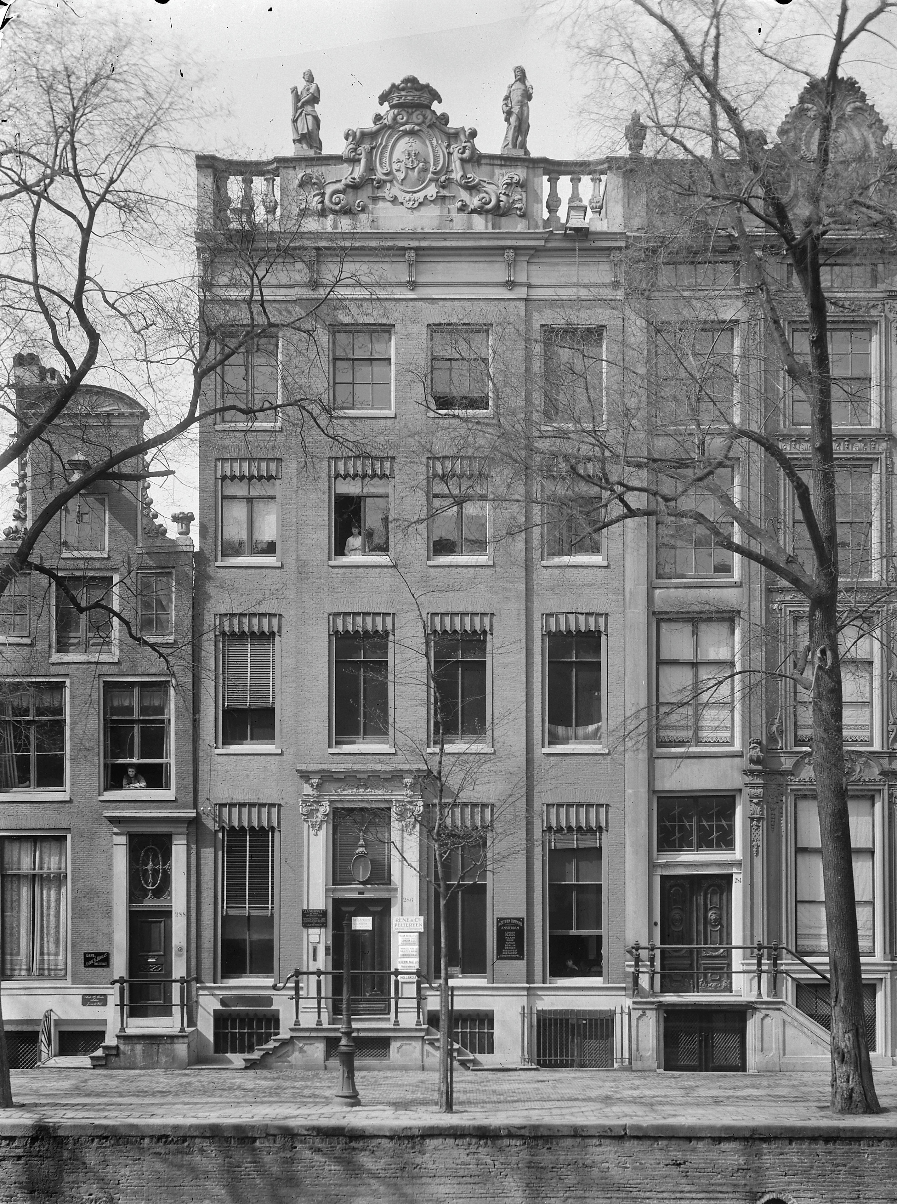 Gevel: Overzicht voorgevel (opmerking: In: Buiten ; 17(1923), nr. 24, p. 288)